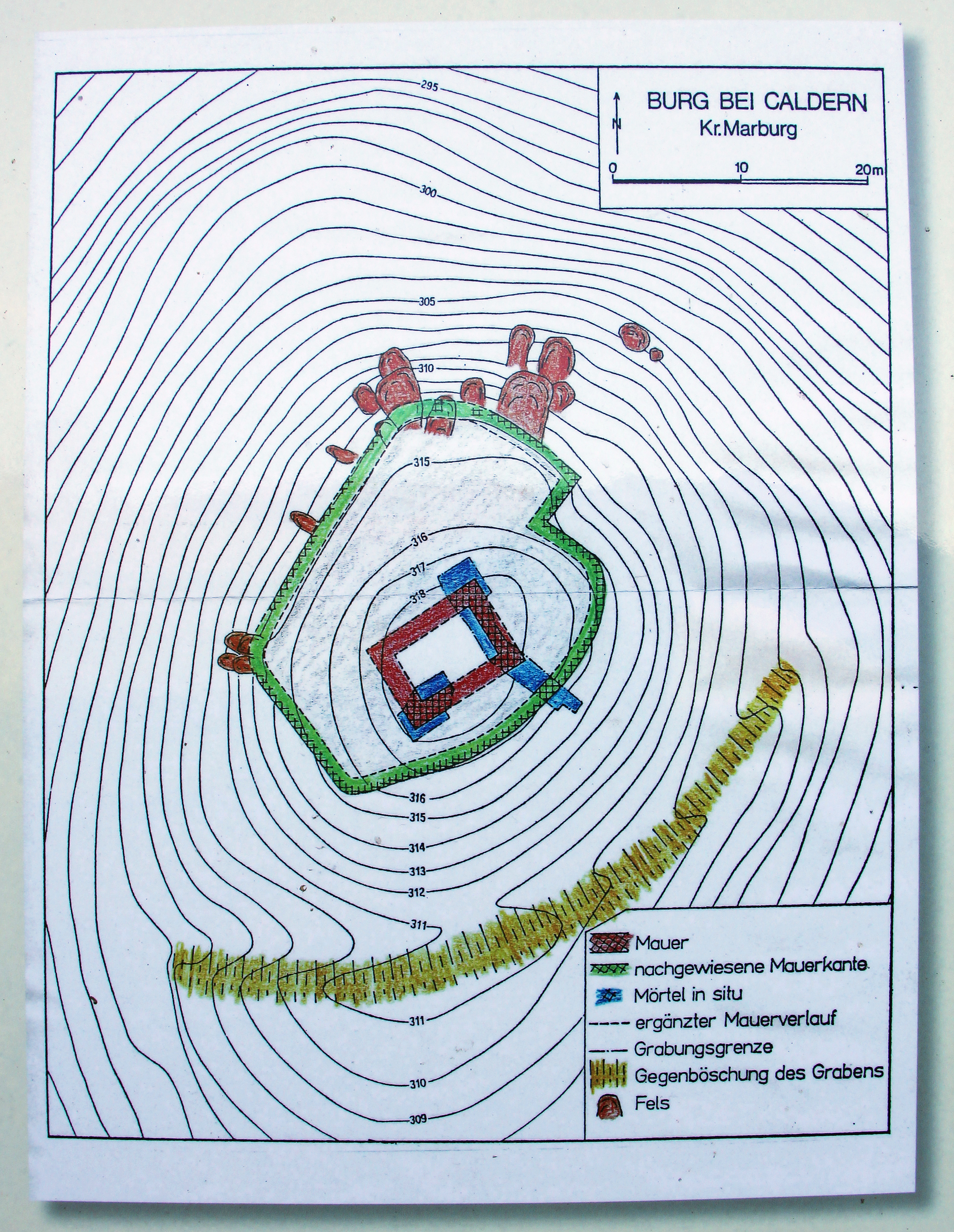 Grundriss der Burgruine bei Caldern auf der Infotafel vor Ort.